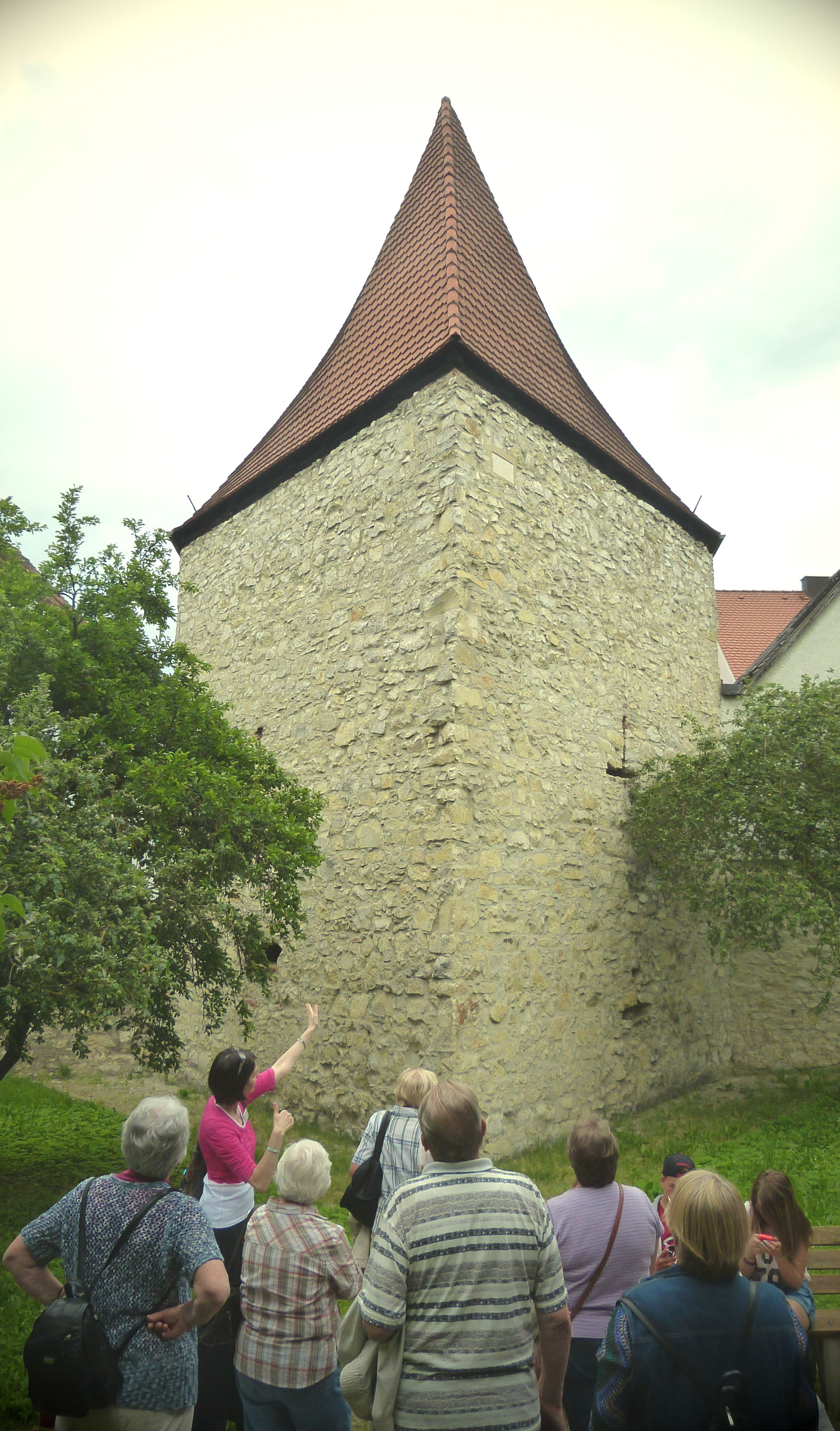 Gästeführung am Folterturm im Stadtgraben in Wemding. In diesem wurden bei der Hexenverfolgungen im 17. Jahrhundert die "peinlichen Befragungen" durchgeführt.